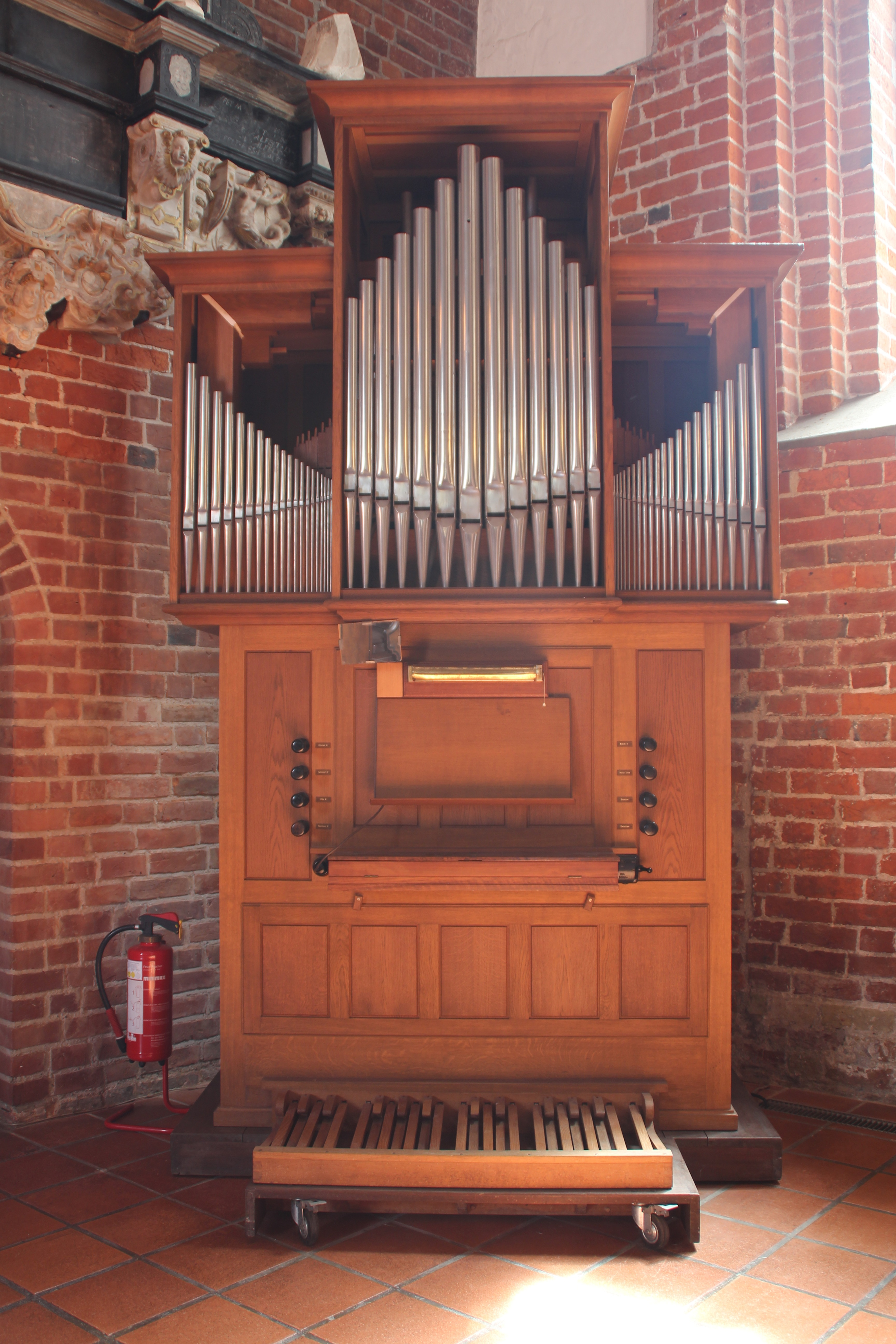 Chororgel der Kirche St. Nicolai zu Eckernförde